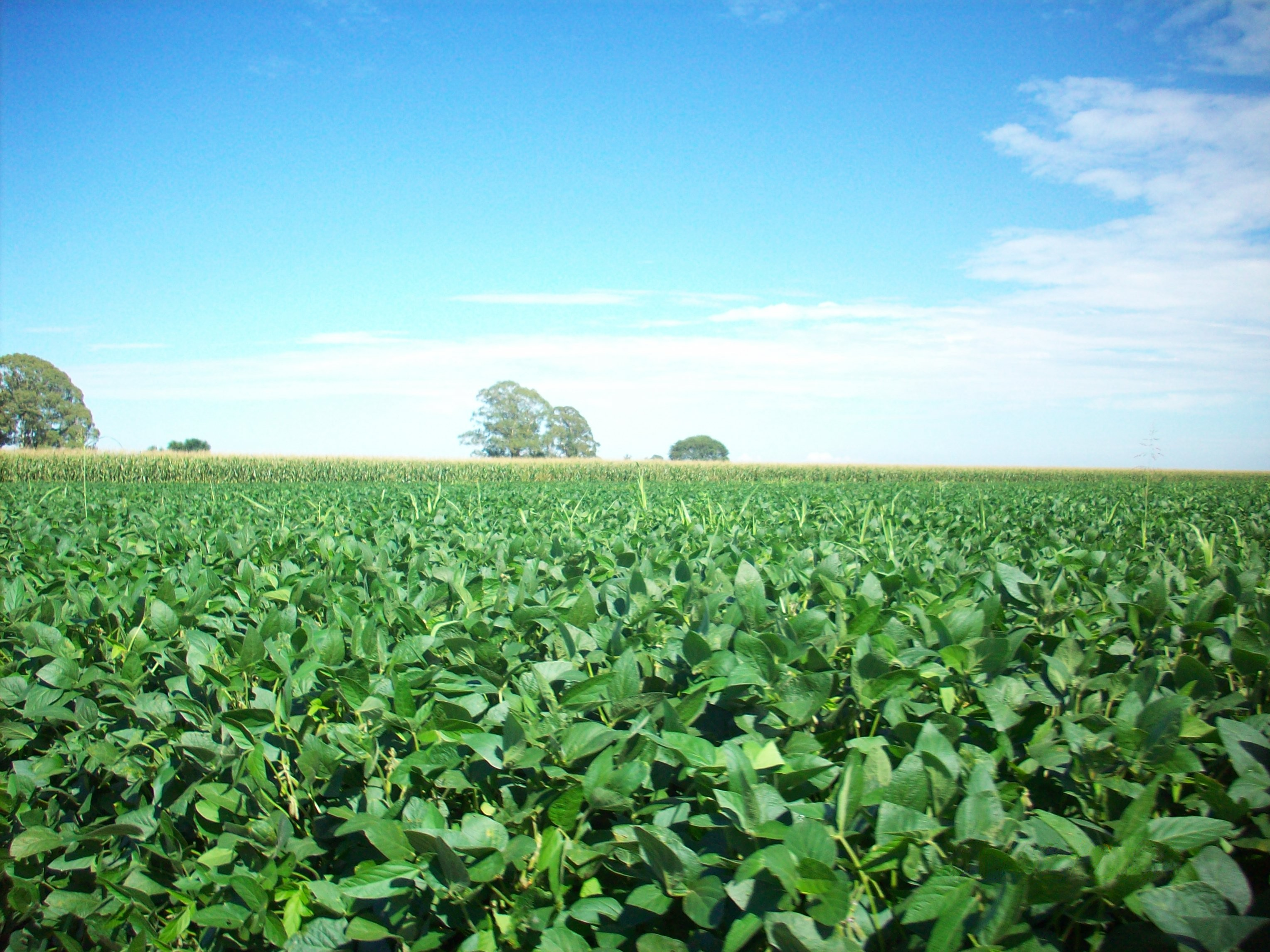 Cultivo de soja (Glycine max) en un campo agrícola de la zona de Runciman, sur de la provincia de Santa Fe, Argentina